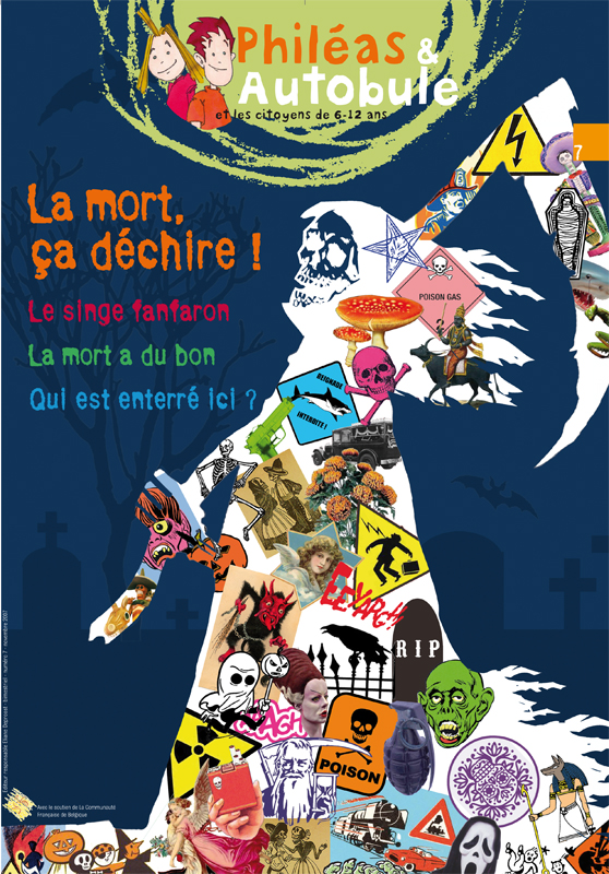 Couverture du numero 7 du magazine "Phileas et Autobule"